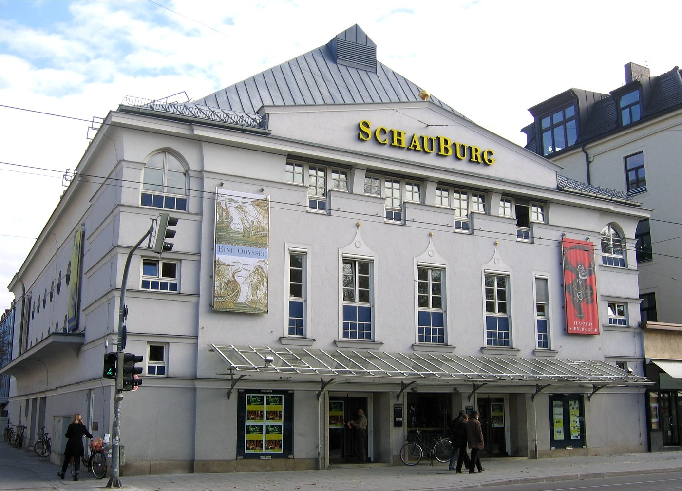 Schauburg München (Elisabethplatz / Franz-Joseph-Straße 47, Schwabing)